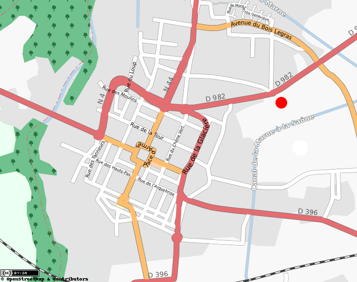 Plan de Vitry-le-François et emplacement de la cité scolaire FrançoisIer.